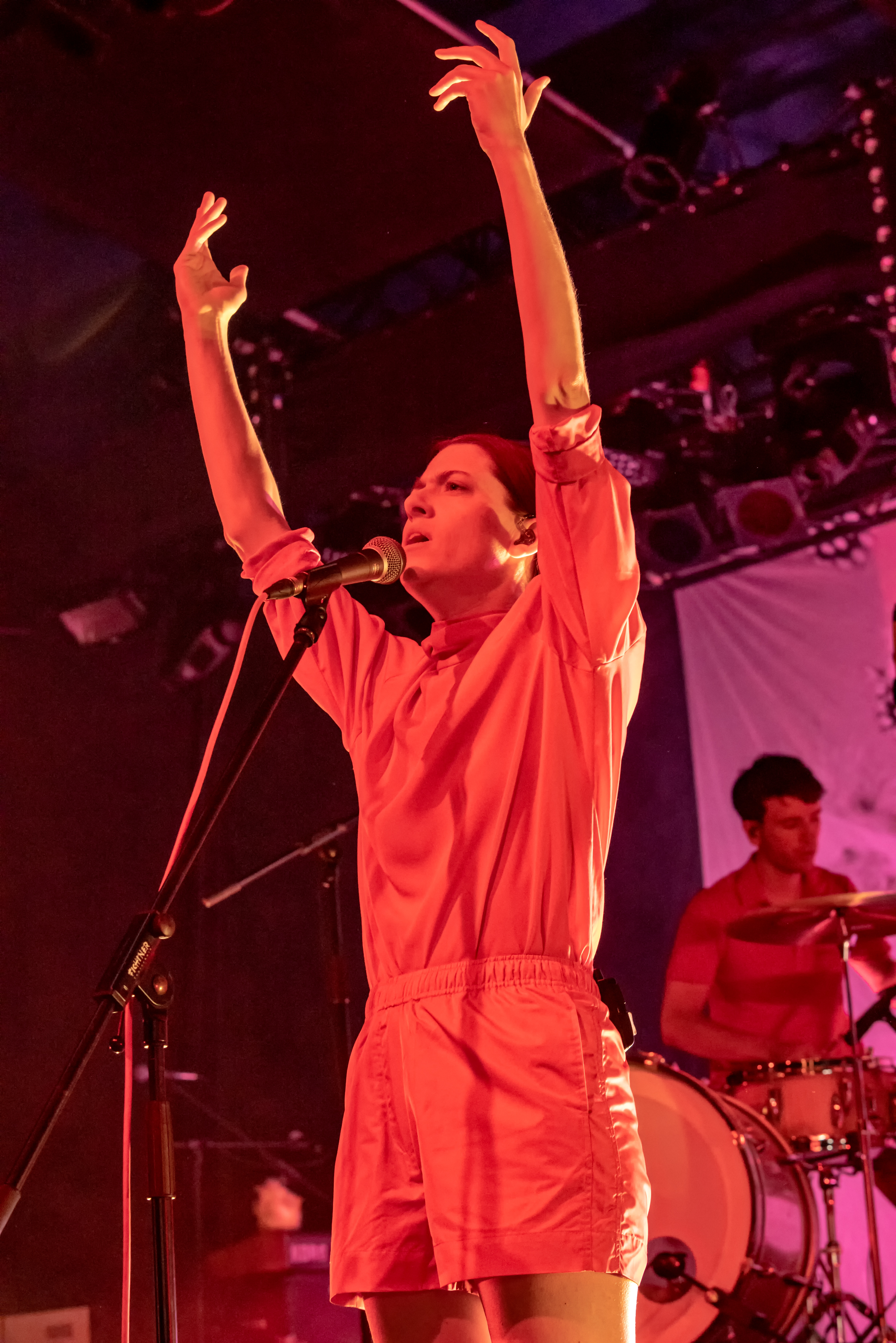 Bilder vom Zelt Musik Festival 2018 in Freiburg im Breisgau Auftritt Kat Frankie am 19. Juli 2018 im Zirkuszelt als Support Akt bei de::Olli Schulz